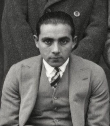 José Miguel Olguín in 1928